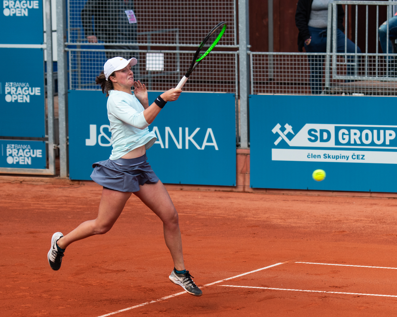 Iga Świątek